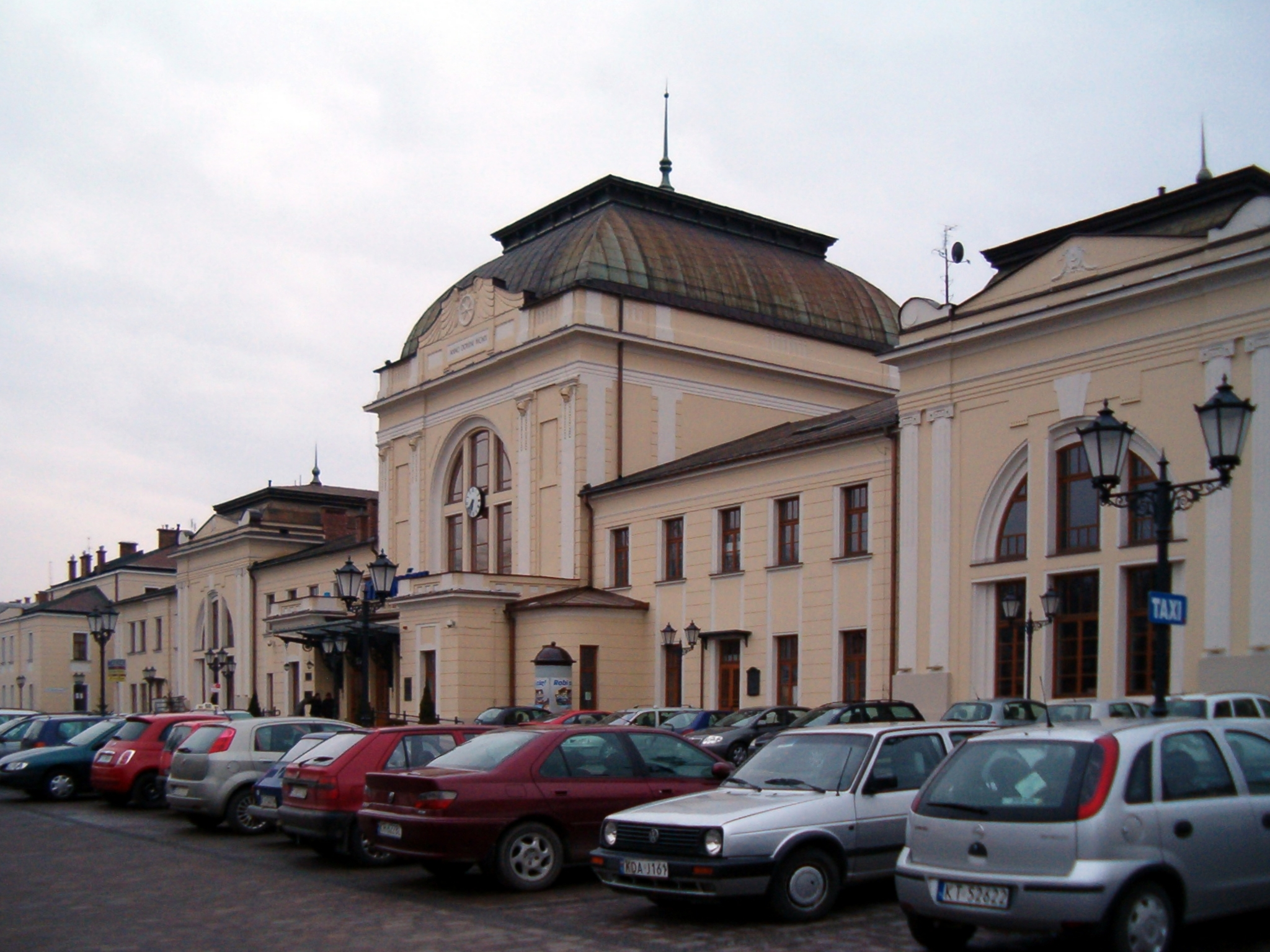 Dworzec kolejowy w Tarnowie